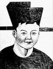 宋帝昺在趙氏家譜裡的畫像影印本。